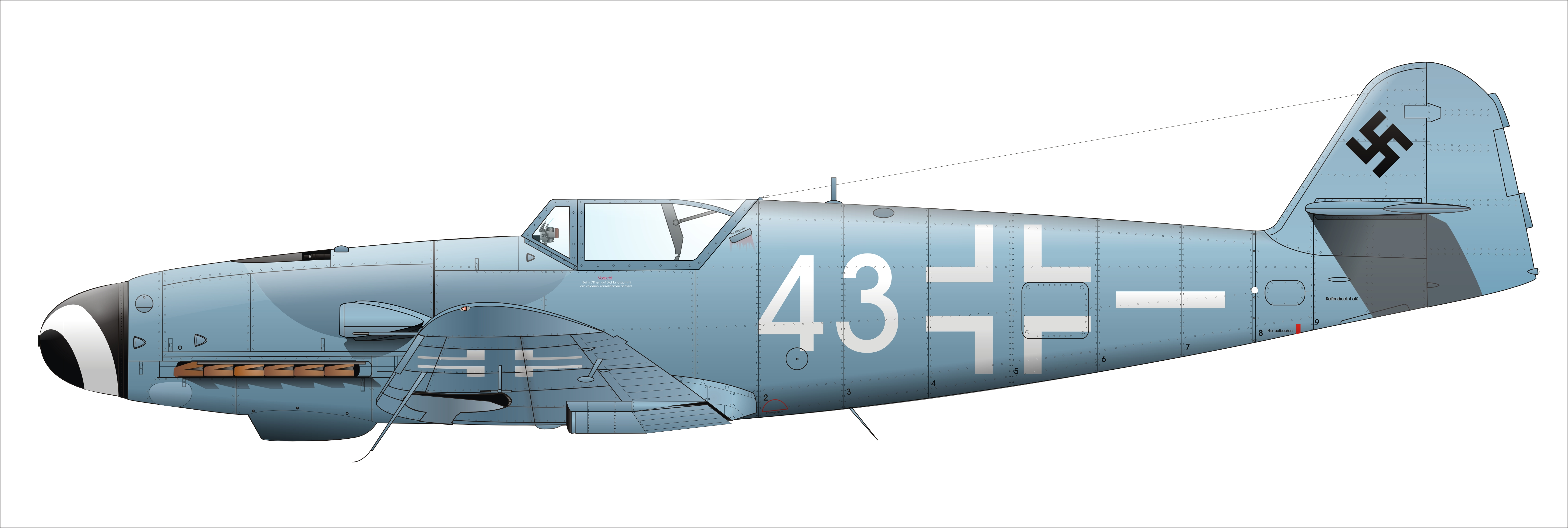 Bf 109 G-10